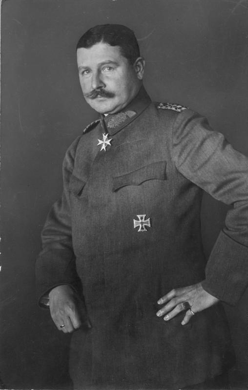 Generalmajor Dr. Wilhelm Groener, Chef des Feldeisenbahnwesens, 29.5.1916 [ Archiveingang ] 9783-16